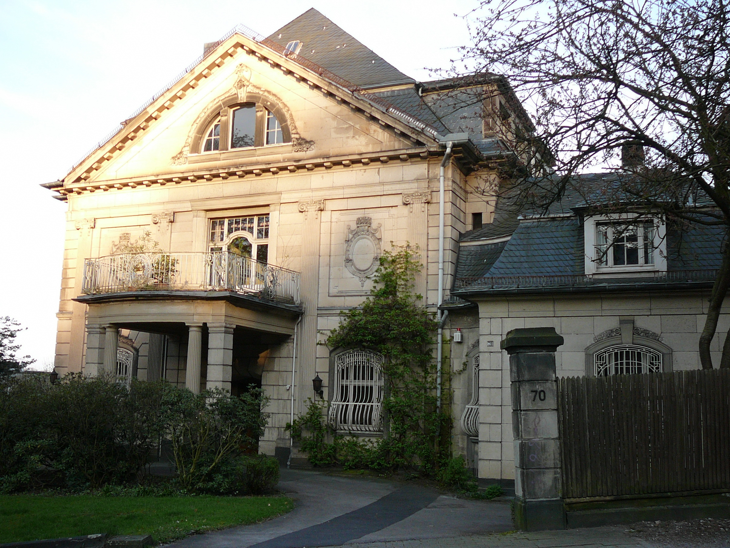 Am Buschhäuschen 70, Wuppertal